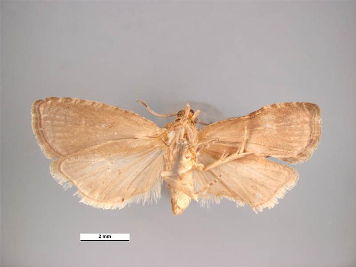 Grapholita molesta ventral view